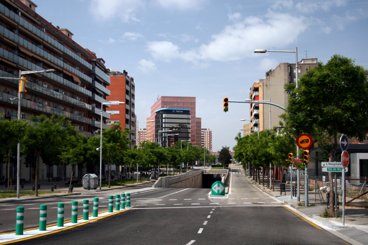 Avinguda del Carrilet